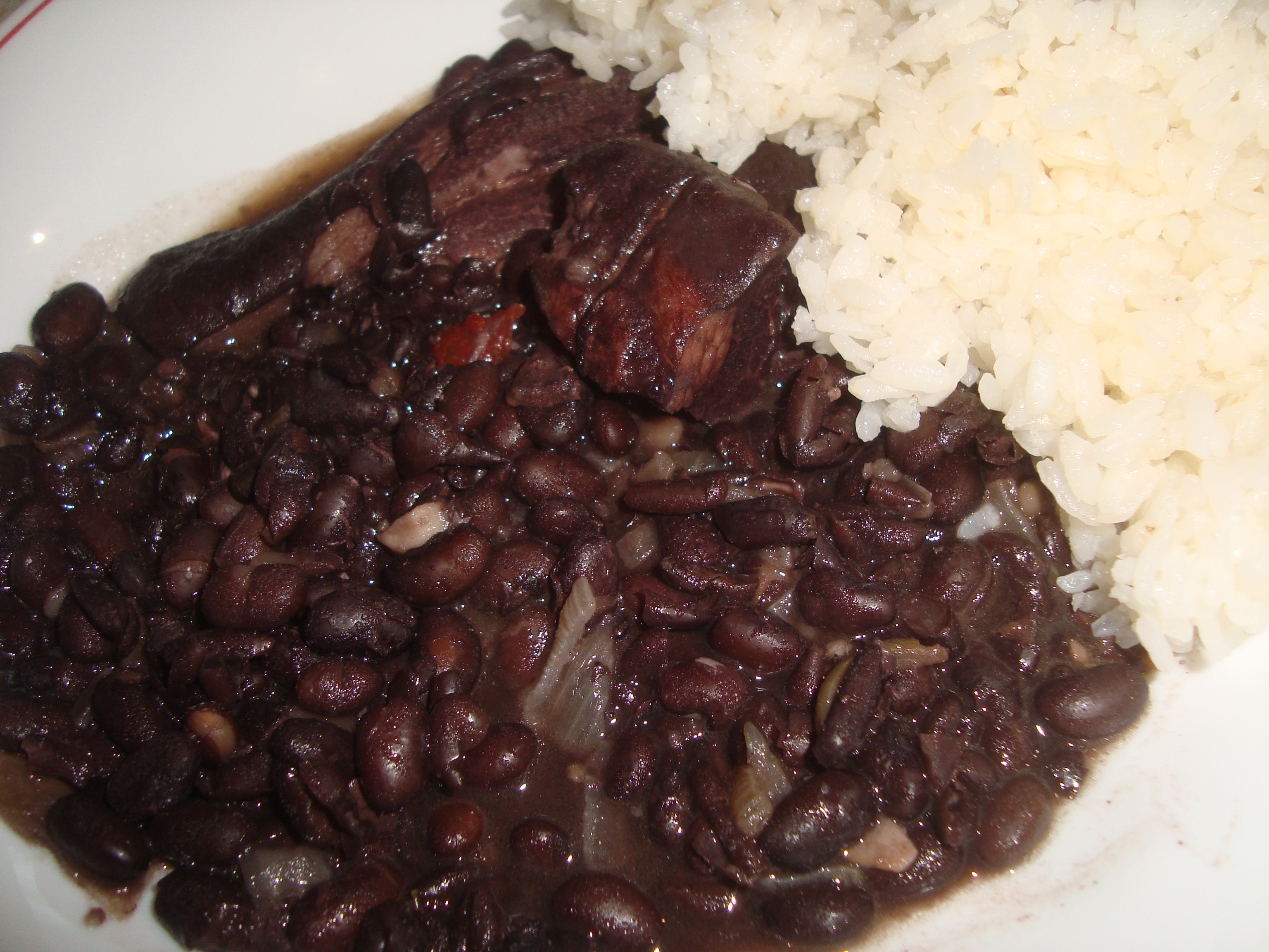 Moros y cristianos, frijoles negros con arróz blanco (gastronomia de Cuba)